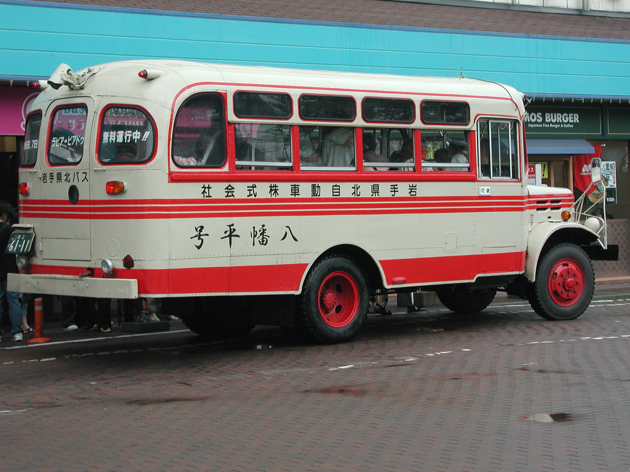 岩手県北自動車：ボンネット車両「八幡平号」（いすゞ・TSD40改）：後部八戸ラピアバスターミナル（八戸市）にて（南部バスなどが主催するイベントによる特別運行より）